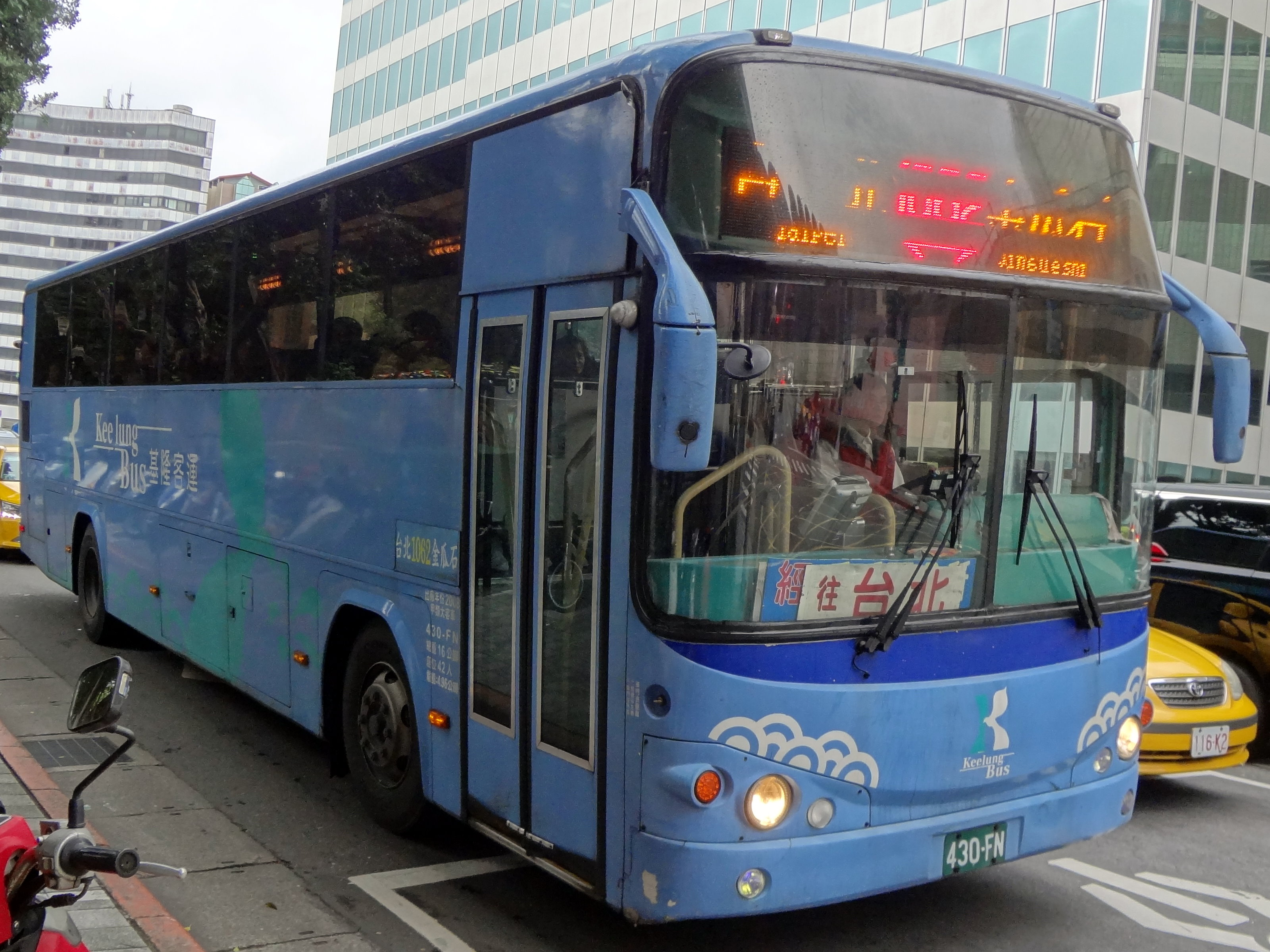 基隆客運日野RN8JRSA大客車430-FN，行駛1062線，車體製造商為三坤車體。